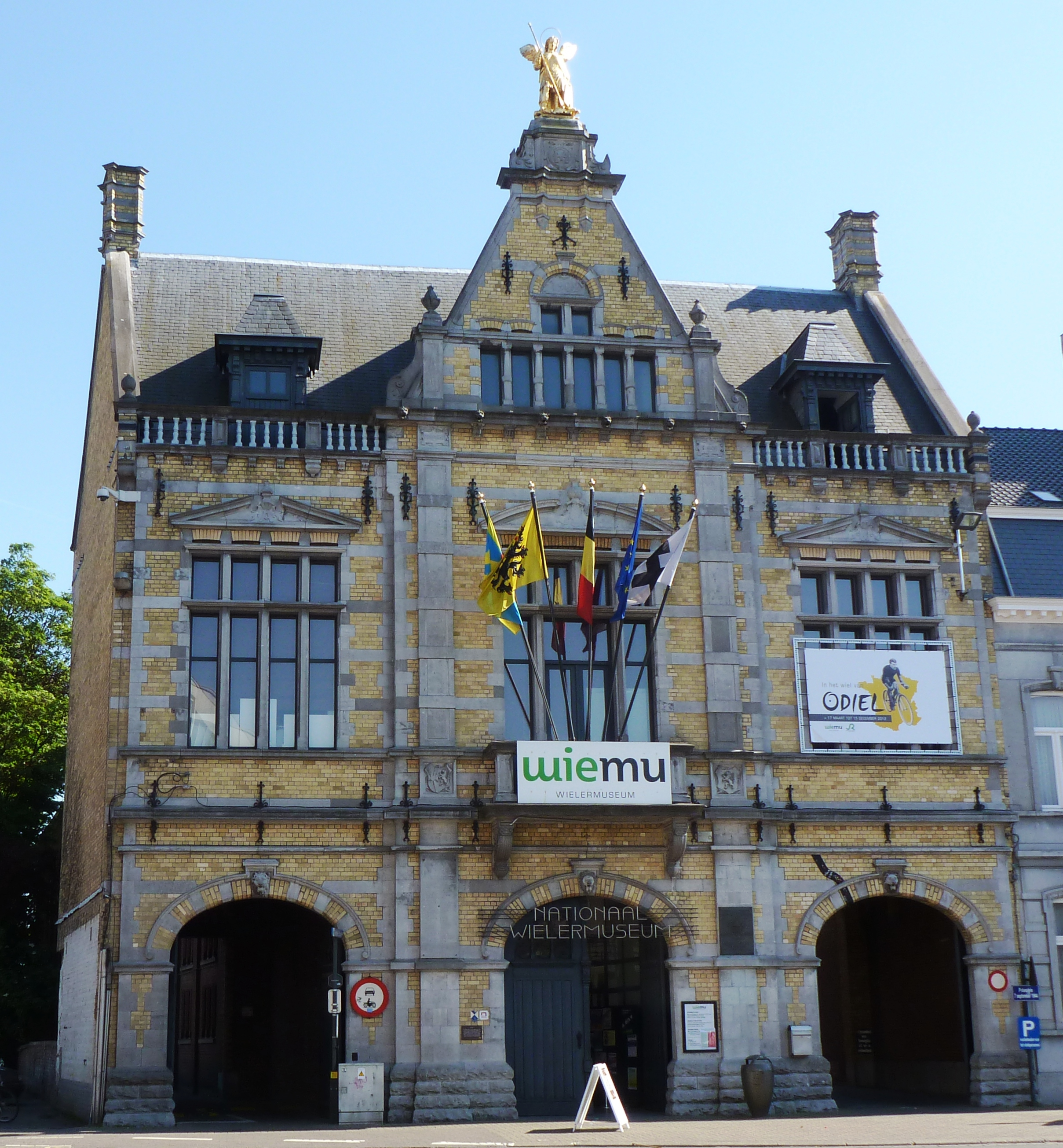 National Wielermuseum in Roeselaere, Belgien